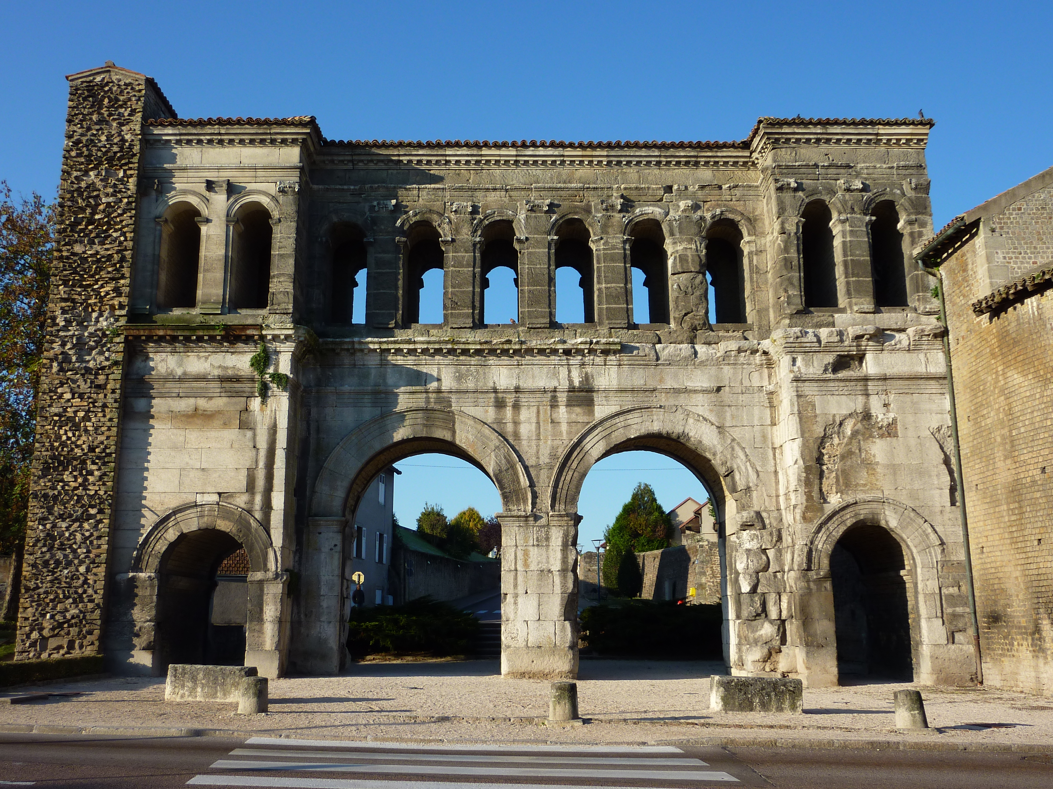 La porte Saint-André d'Autun (Saône-et-Loire, France)